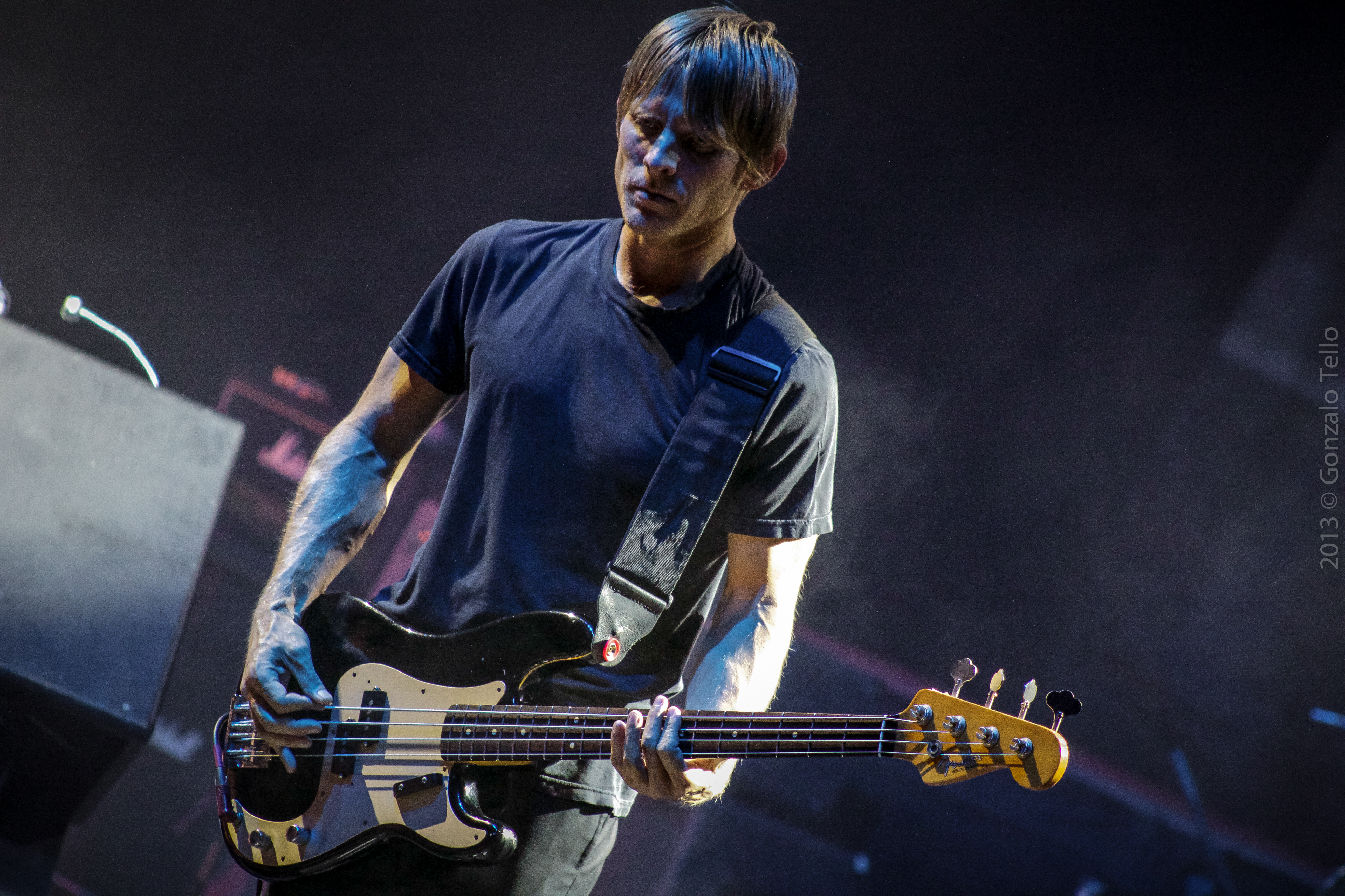 Foto: Gonzalo Tello